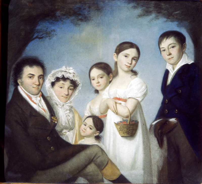 Лев Николаевич Энгельгардт с женой Екатериной Петровной, ур. Татищевой и их дети: Софья (1811–1884), Наталья (1806–1826), Анастасия (1804–1860) и Пётр (1800–1848).